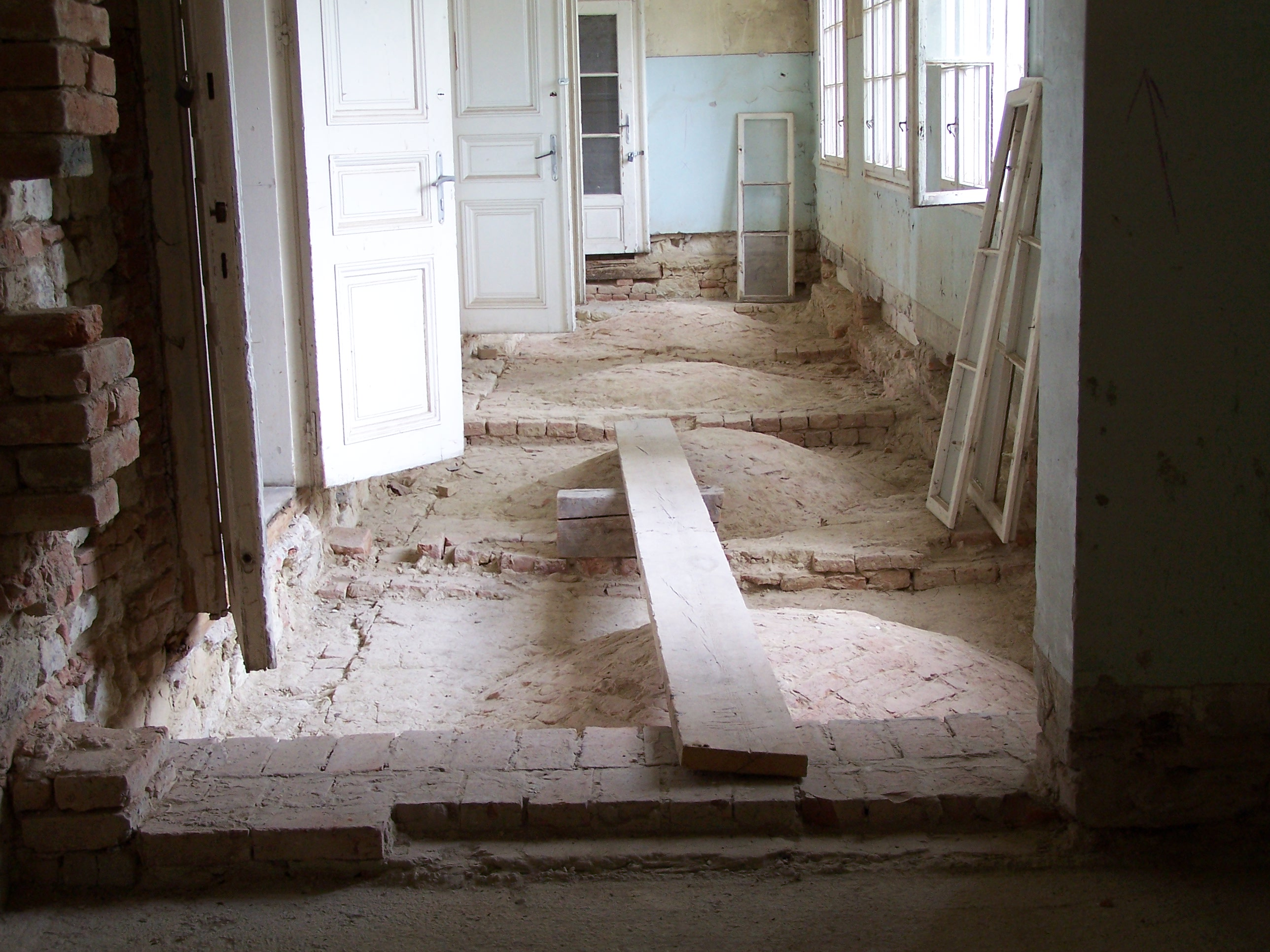 Füzérradvány Károlyi-kastély szállodaszárny emeleti folyosó feltárás közben This is a photo of a monument in Hungary. Identifier: 2768